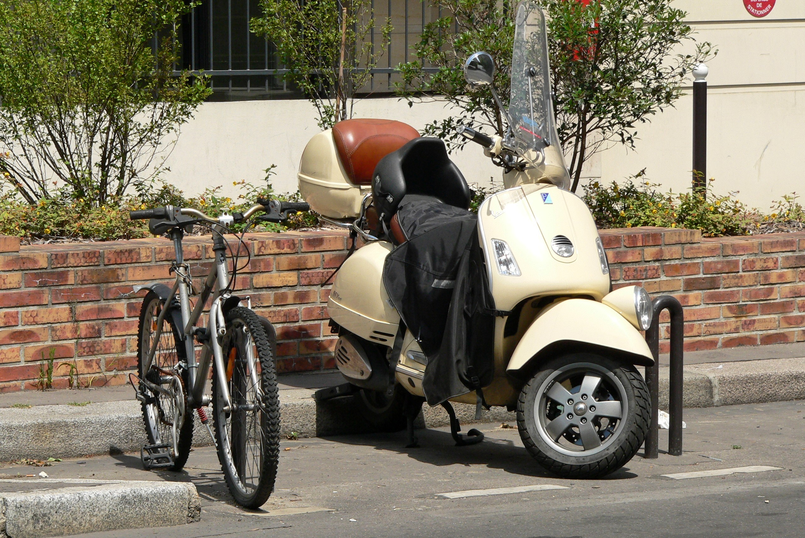 deux moyens de locomotion pratiques dans Paris